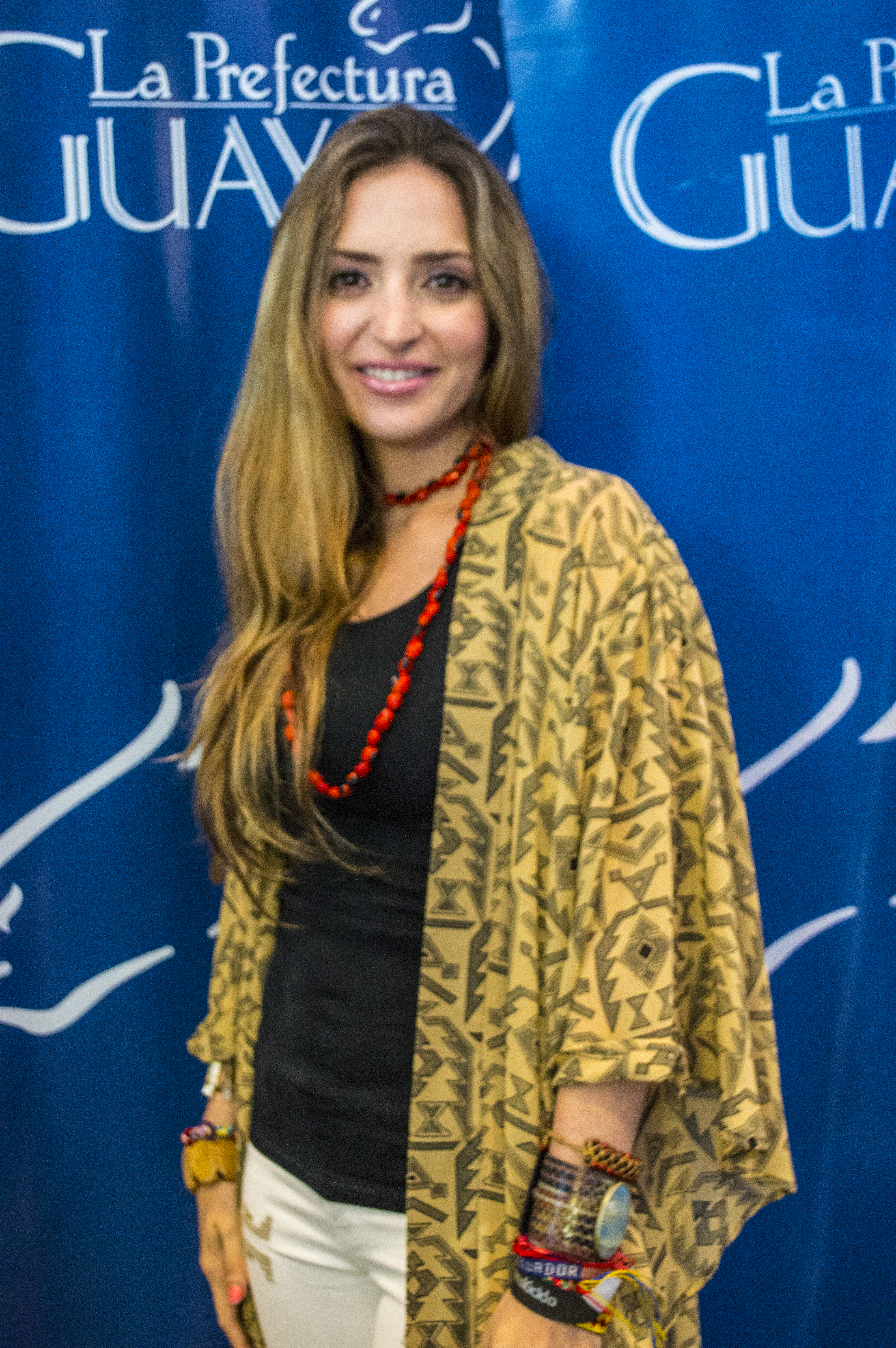 Mirella Cesa en 2016